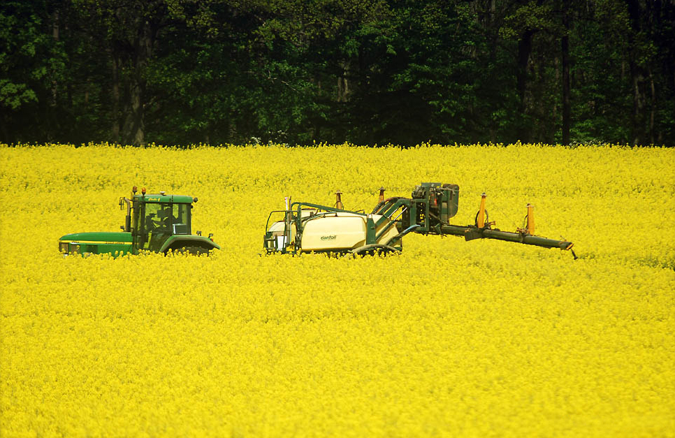 Besprutning raps - skåne Sweden